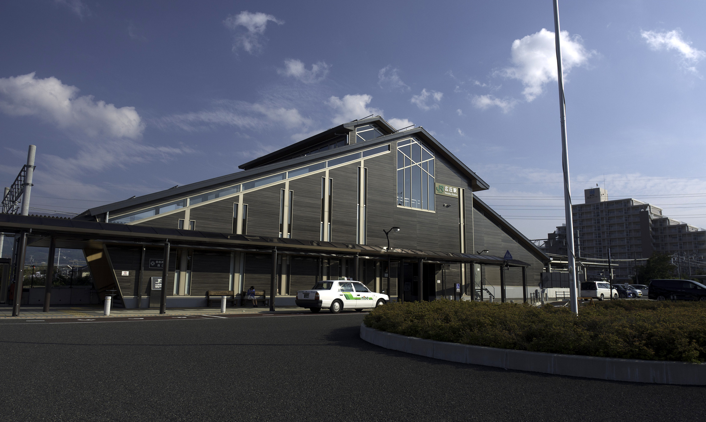 東日本旅客鉄道株式会社篠ノ井線広丘駅駅舎